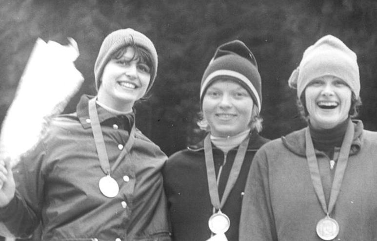 Margit Schumann, Ute Rührold, Eva-Maria Wernicke ADN-ZB Schaar 11.1.1976-Oberhof: DDR-Meisterschaften im Rennschlittensport-Bei den DDR-Rennschlittenmeisterschaften in Oberhof sind die Würfel gefallen. Sieger in der Konkurrenz der Damen wurde am 11.1. Margit Schumann (Mitte) vom ASK Oberhof. Den zweiten Platz belegte Ute Rührold, Dritte wurde Eva-Maria Wernicke (r.) - beide SC Traktor Oberwiesenthal.